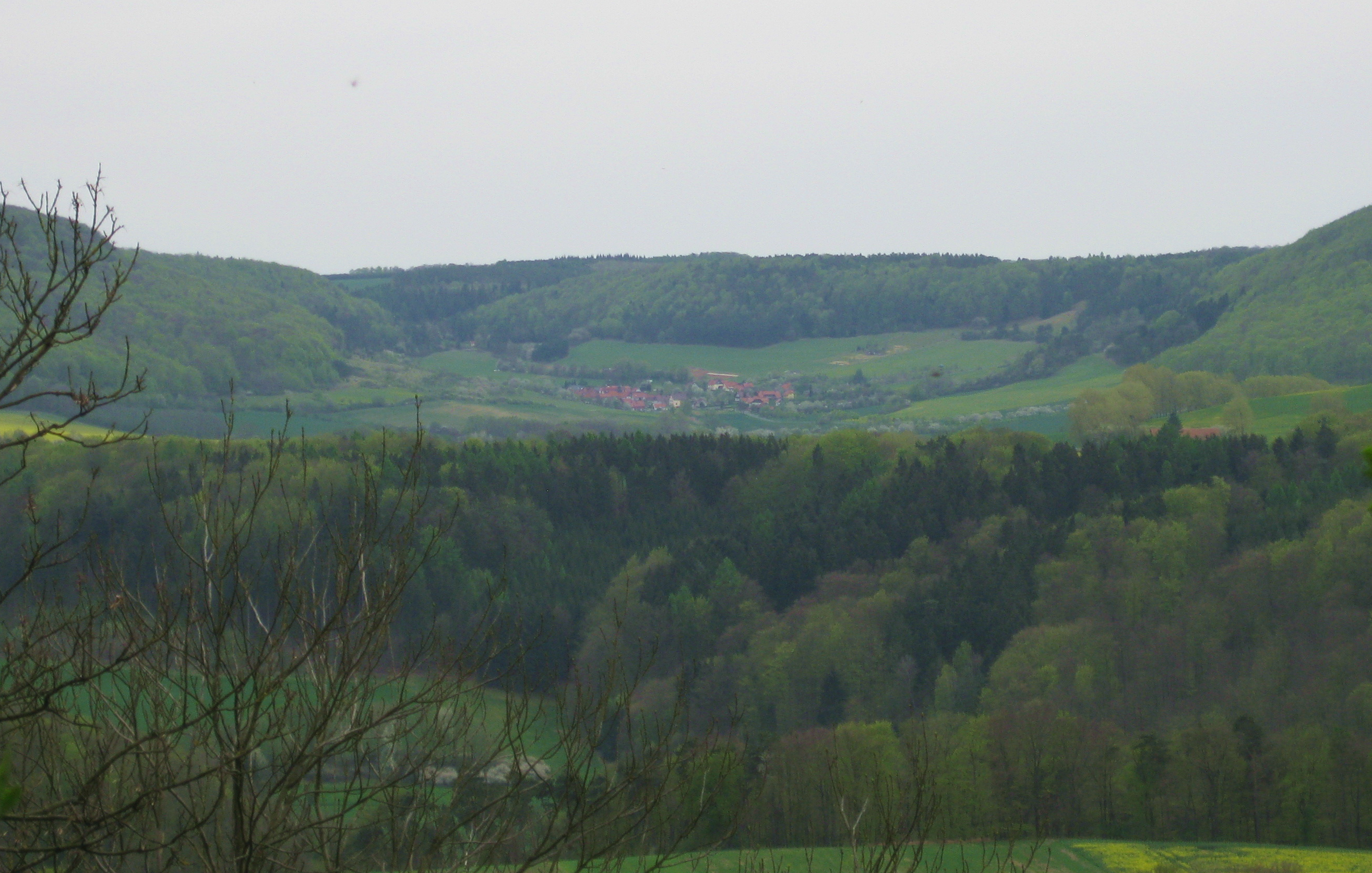 Ansicht auf Schönhagen im Eichsfeld (ganz vorn das Leinetal, Berge: im Hintergrund der Röhrsberg, links der Gr. Iberg und rechts der Ochsenberg)